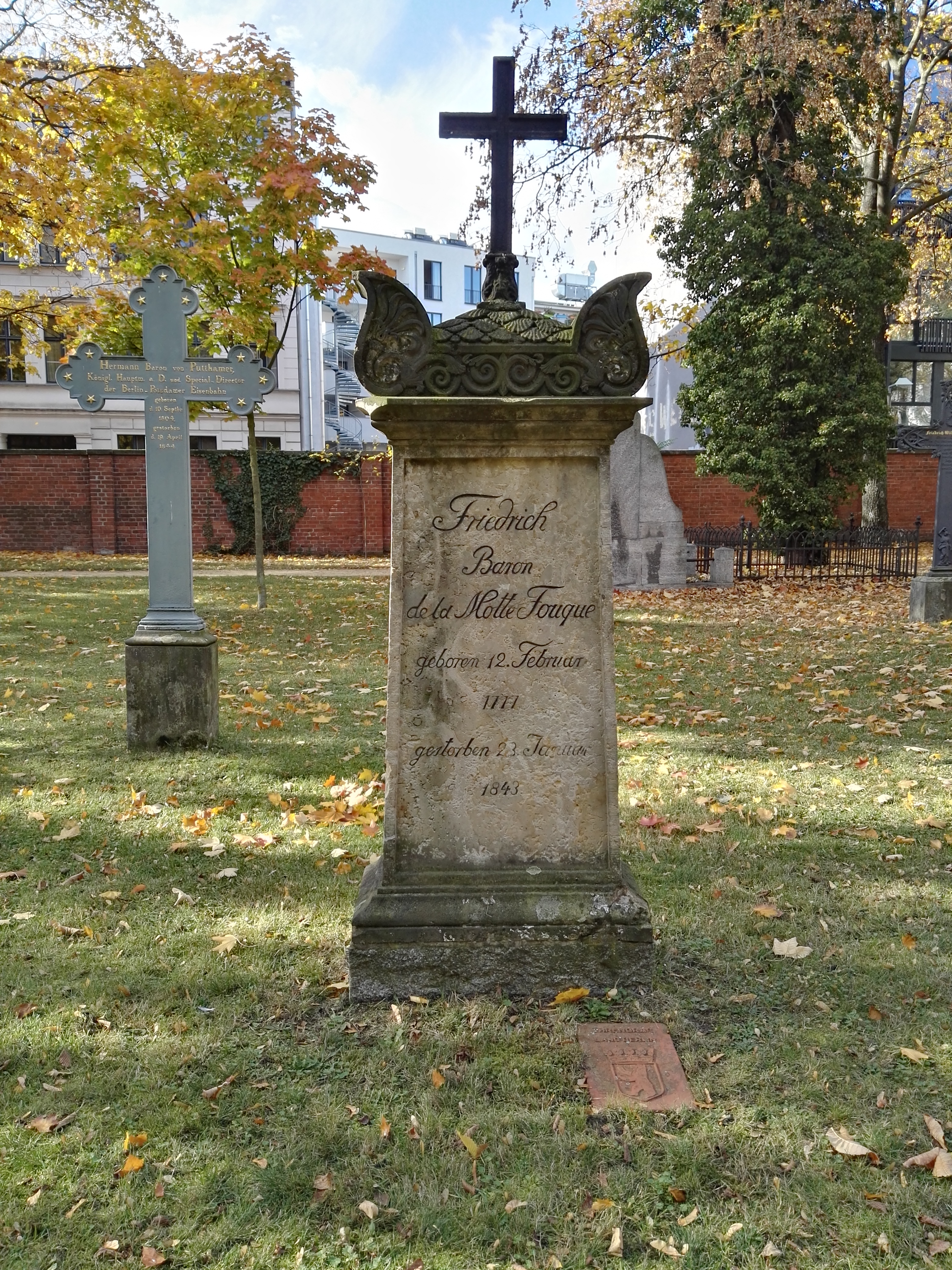 Grab von Friedrich de la Motte Fouqué auf dem Alten Garnisonfriedhof in Berlin-Mitte; Ehrengrab der Stadt Berlin